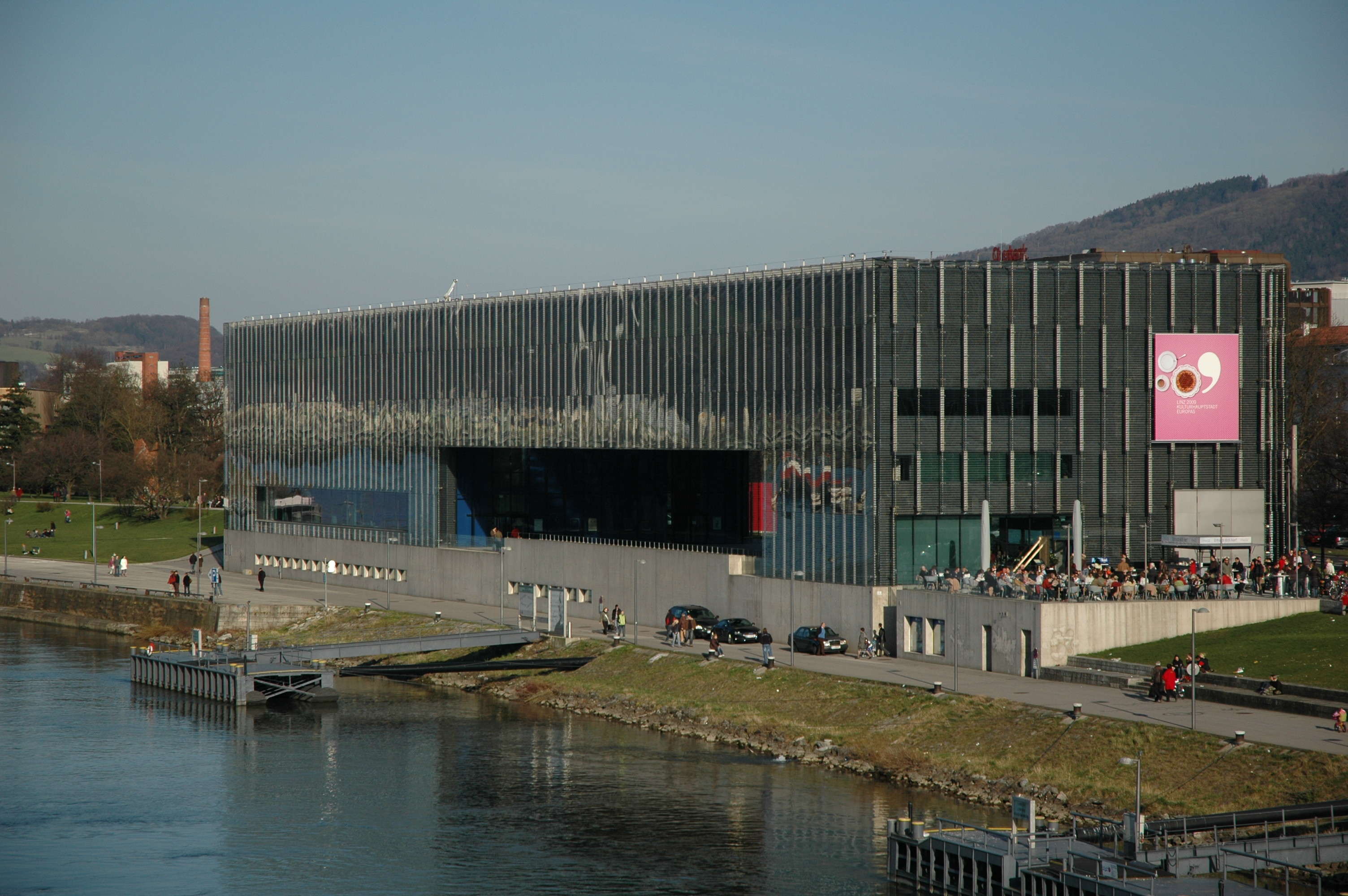 Linzer Museum "Lentos" von der Donau gesehen.